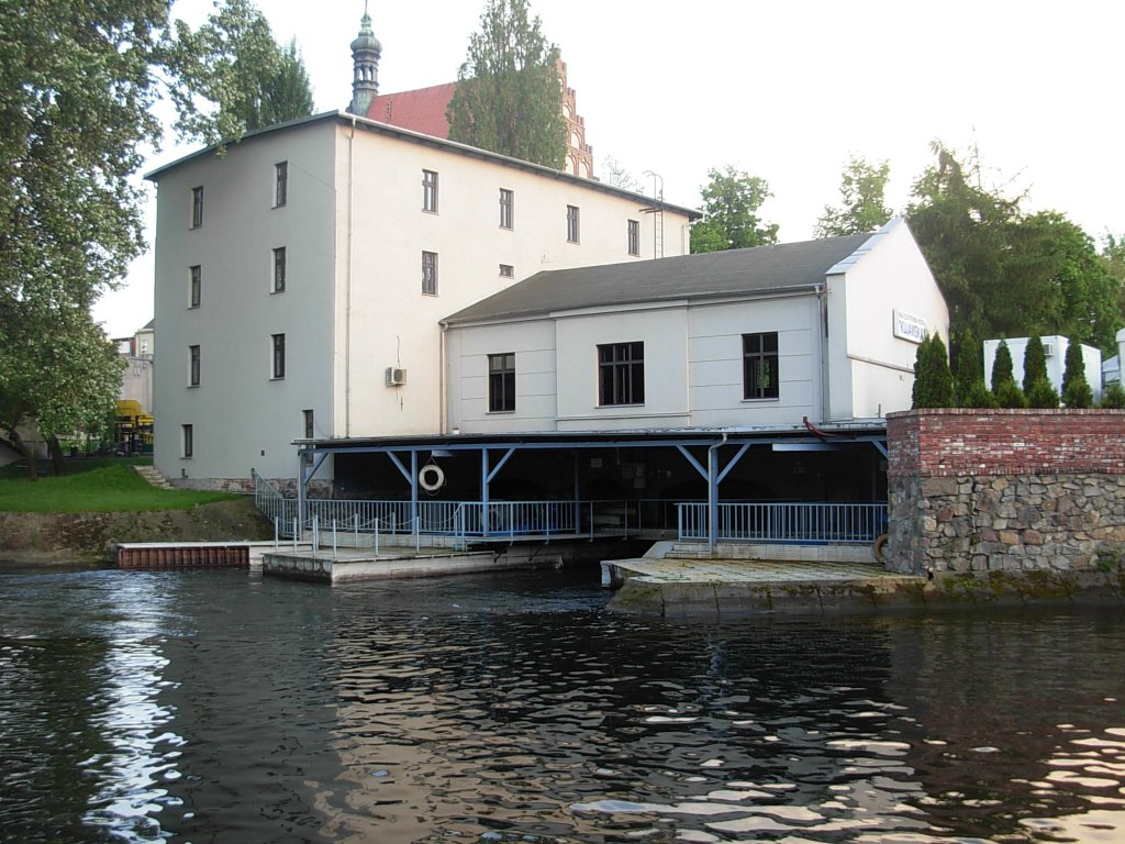 Elektrownia wodna "Kujawska" w Bydgoszczy